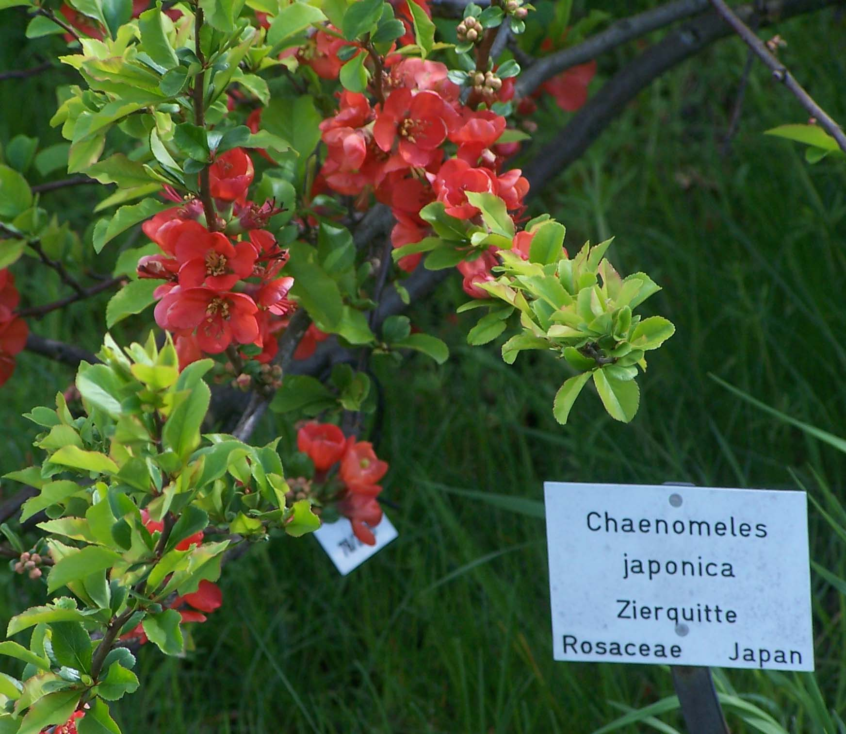 Blühpflanzenporträt Chaenomeles Japonica